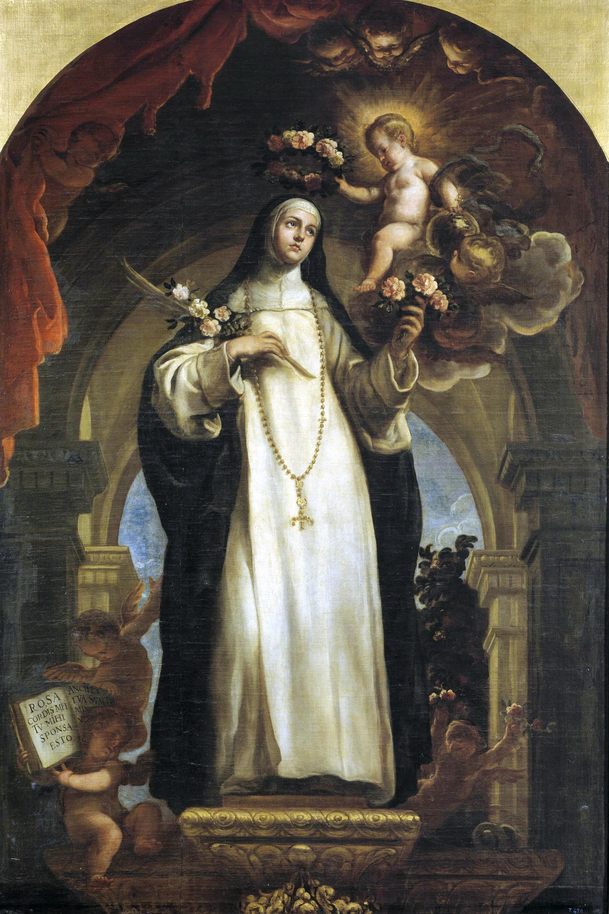 El lienzo representa a Santa Rosa de Lima.